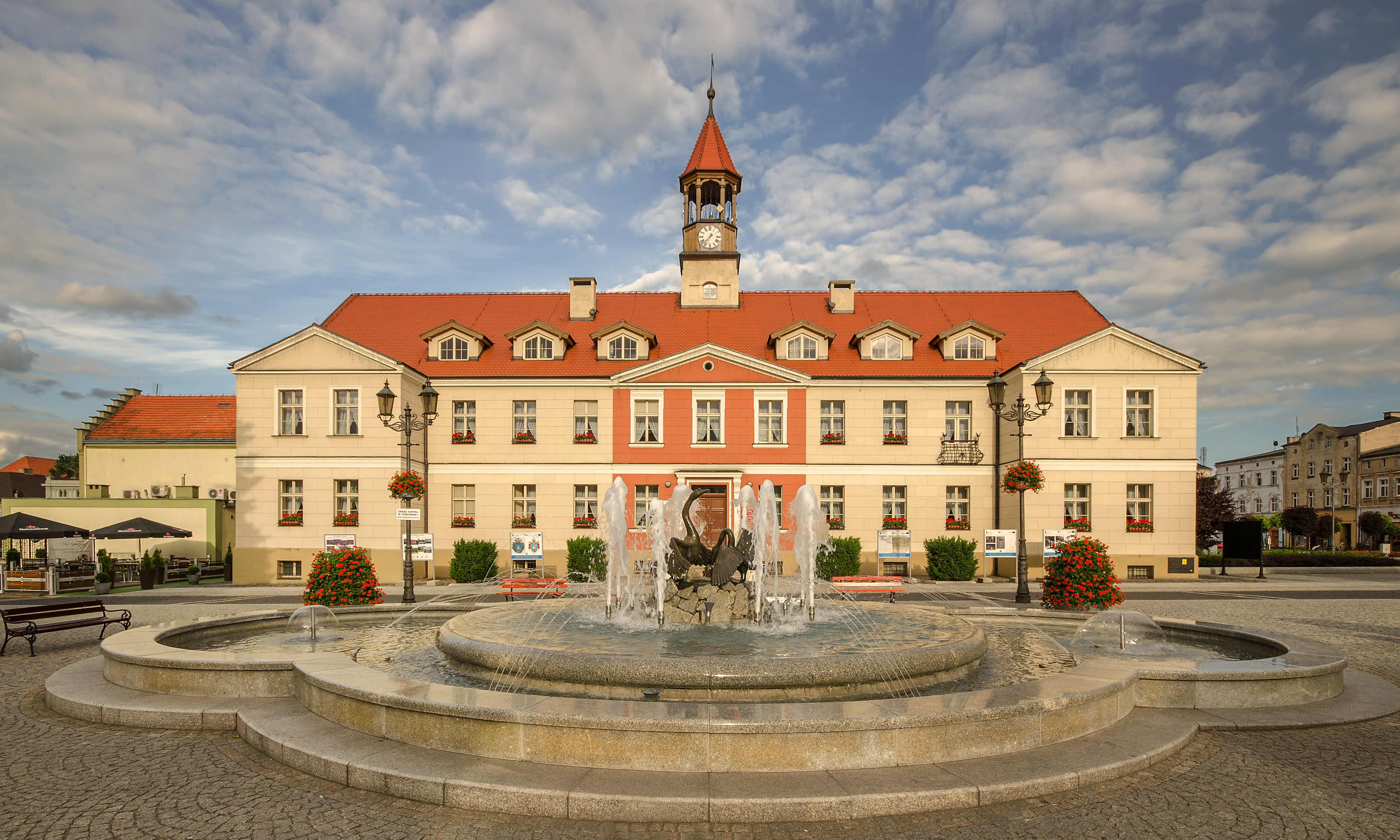 Kępno, ratusz, 1864